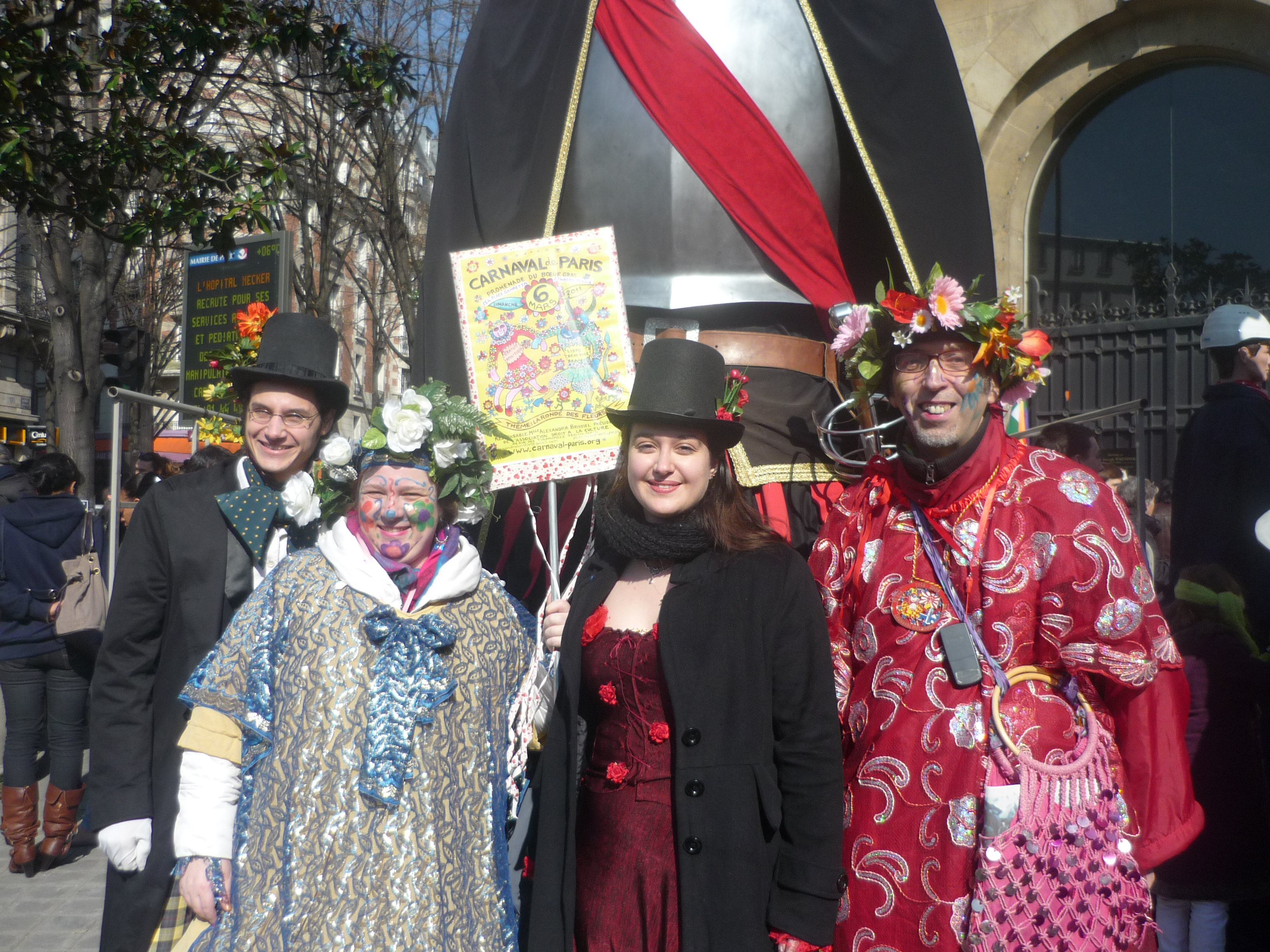 Un groupe de joyeux carnavaleux parisiens, photo prise le 6 mars 2011 place Gambetta, Paris 20ème, au pied d'un géant belge devant la mairie du 20ème, peu avant le départ du cortège du Carnaval de Paris 2011. De gauche à droite : Antoine Charneau comédien, Alexandra Bristiel présidente du Carnaval de Paris et du Carnaval des Femmes de Paris, Gabrielle Savelli comédienne et Basile Pachkoff historien du Carnaval de Paris.